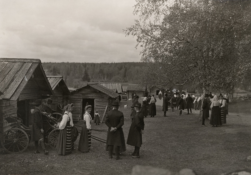 depicted place: Dalarna, Rättvik, Rättvik, Rättviks kyrka (Sverige (SE))